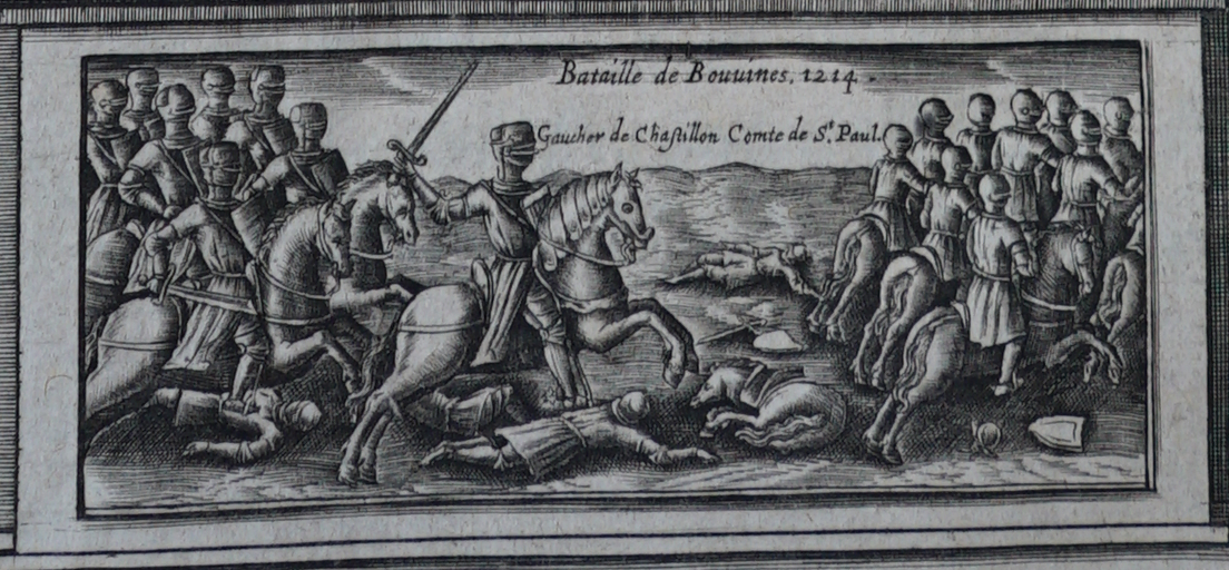 issu du livre &crit par Du Chesne.